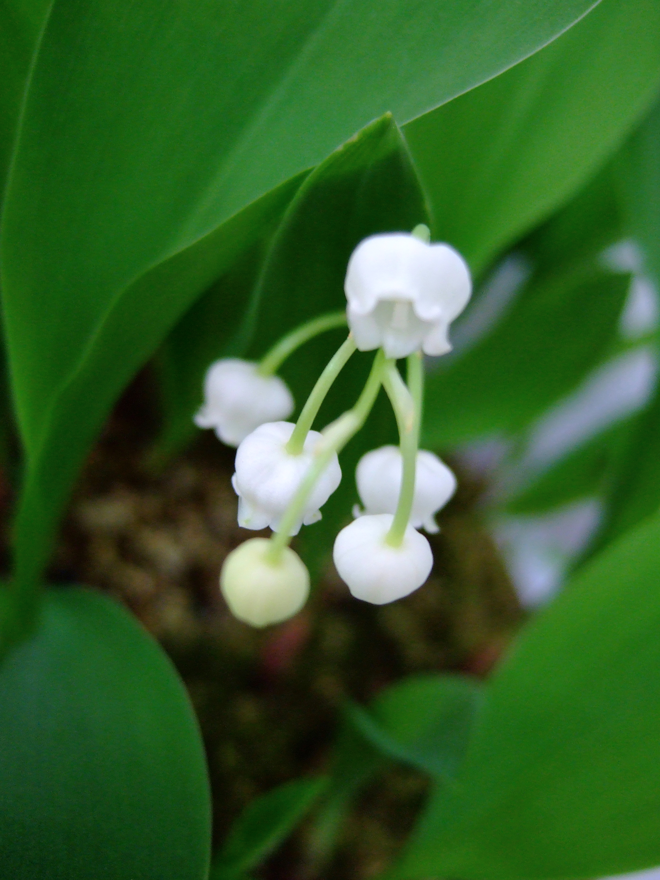 兵庫県立フラワーセンター